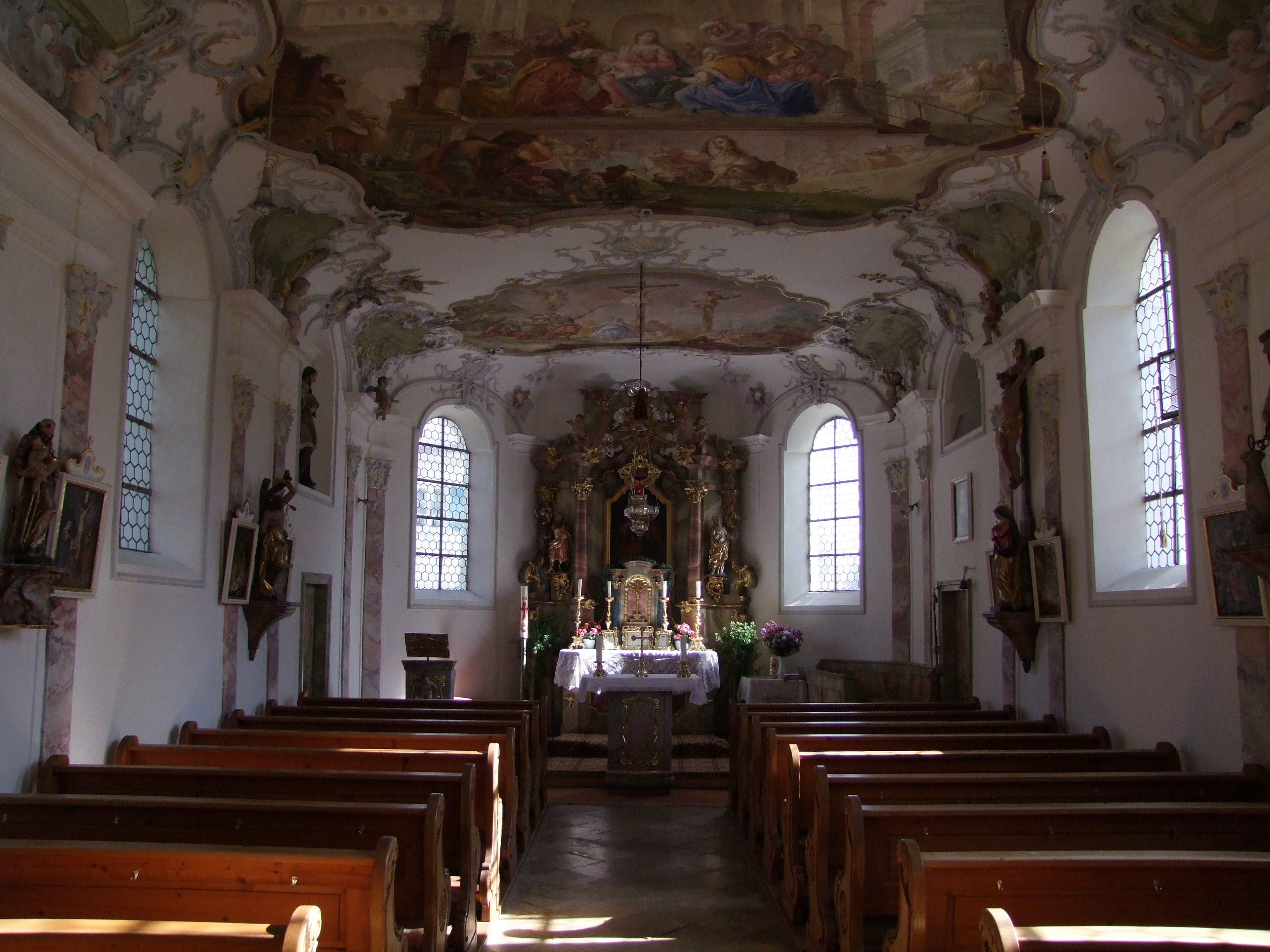 Unserer Lieben Frau im oberschwäbischen Oberrammingen,, Ortsteil von Rammingen in Bayern/Schwaben